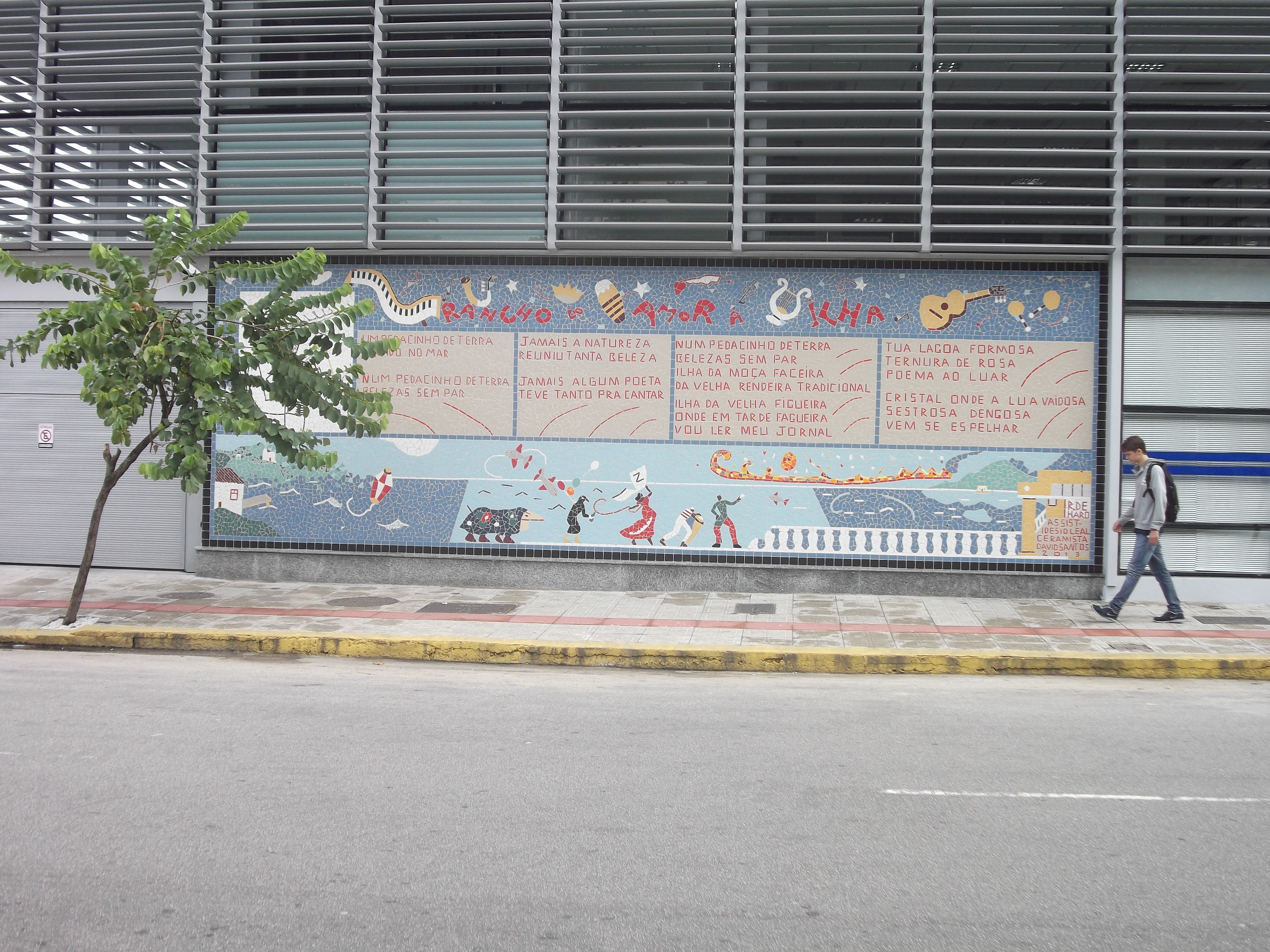 Mosaicos em Florianópolis